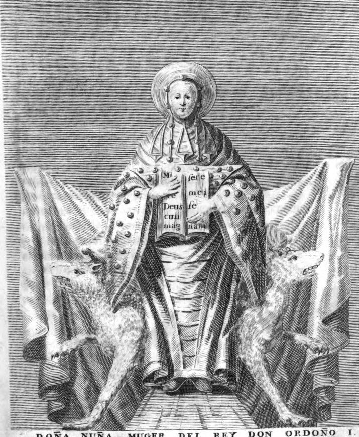 Grabado que representa a la reina Nuña, esposa del rey Ordoño I de Asturias, hijo de Alfonso III el Magno, rey de Asturias.